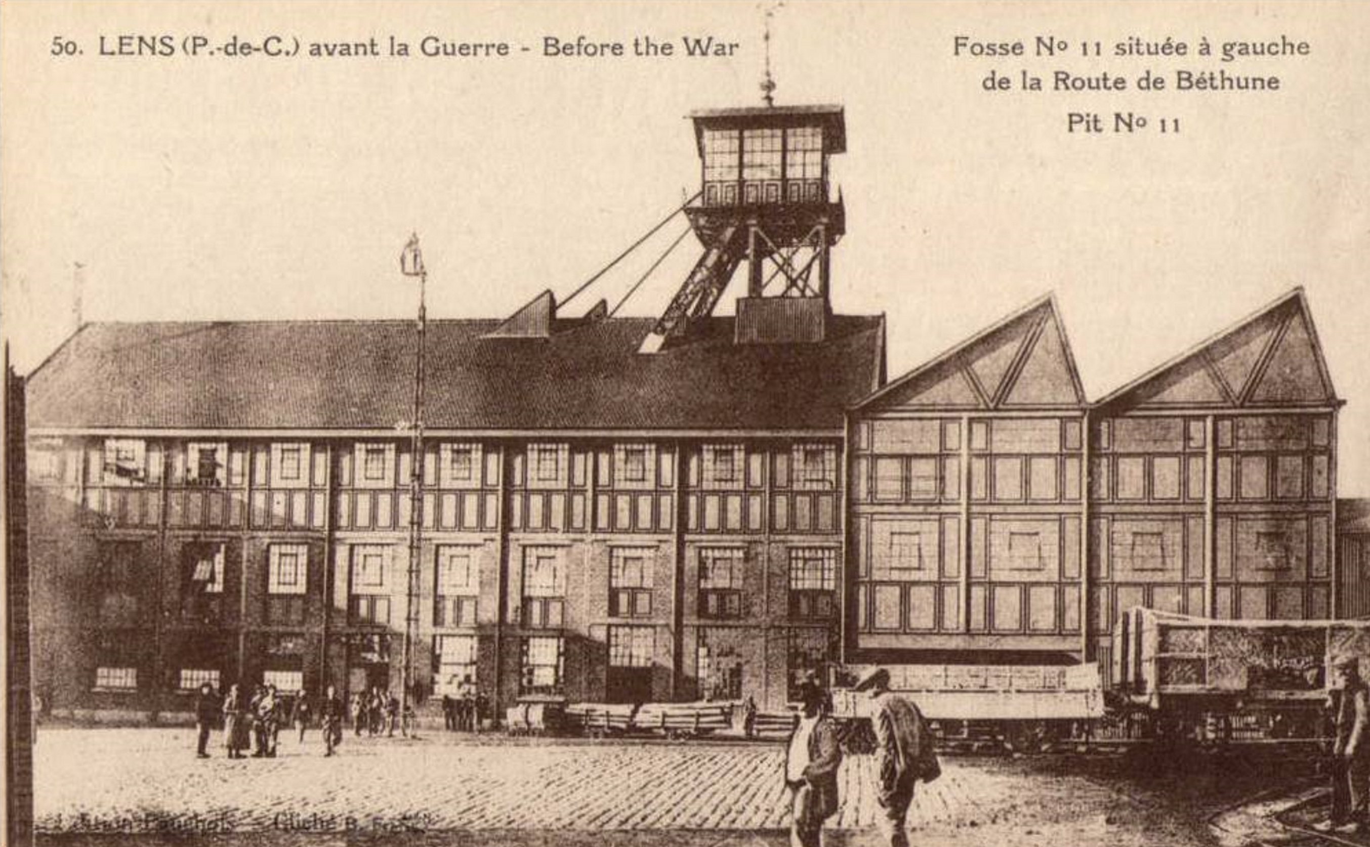 La Fosse n° 11 - 19 de la Compagnie des mines de Lens était un charbonnage constitué de deux puits situé à Loos-en-Gohelle, Pas-de-Calais, Nord-Pas-de-Calais, France.